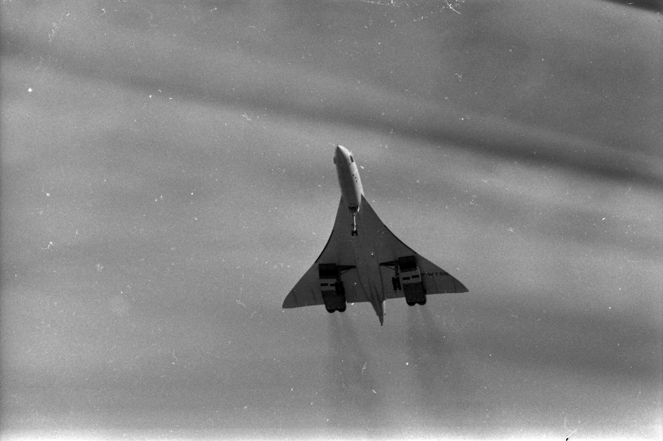 Hall de l'Aérogare Blagnac 1. 2 mars 1969. Vue d'ensemble du Concorde en vol, vue de dessous. Cliché lors du 1er vol d'essai du Concorde.